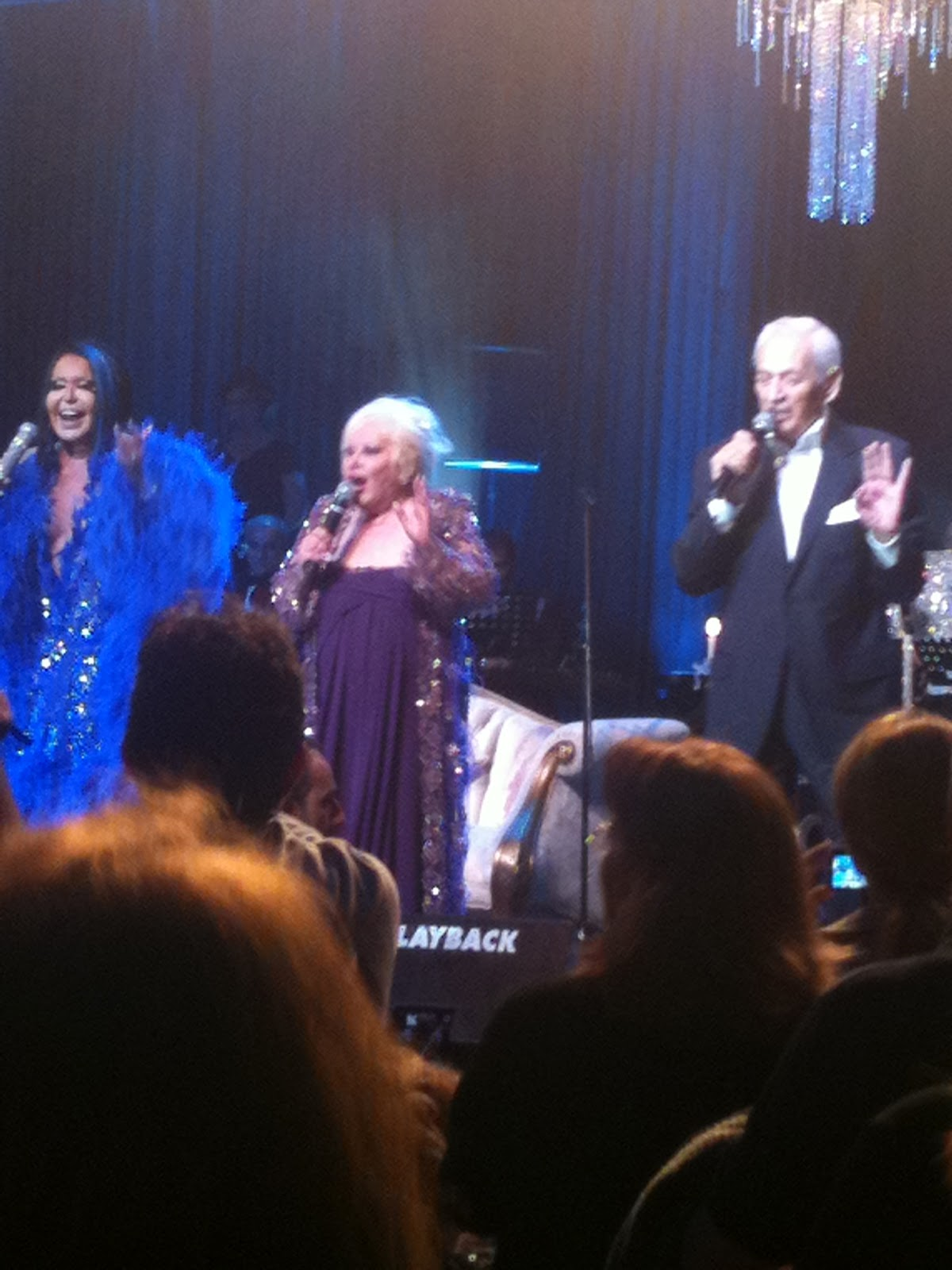 Adnan Şenses, Bülent Ersoy, Muazzez Abacı üçlüsü tarafından Bostancı Kültür Merkezi'nde düzenlenen Klasik Türk Müziği konserinde Bülent Ersoy sahne performansıyla, 2012.